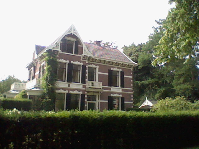 Het huis van de familie De Graaf in de dramaserie Westenwind. Het huis werd ook gebruikt in Gooische Vrouwen, als het huis van Olivier Grootheeze